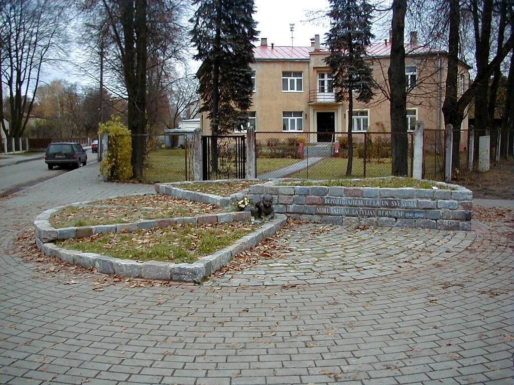 Rīga, deportēto bērnu piemiņas zīme 2002-11-03